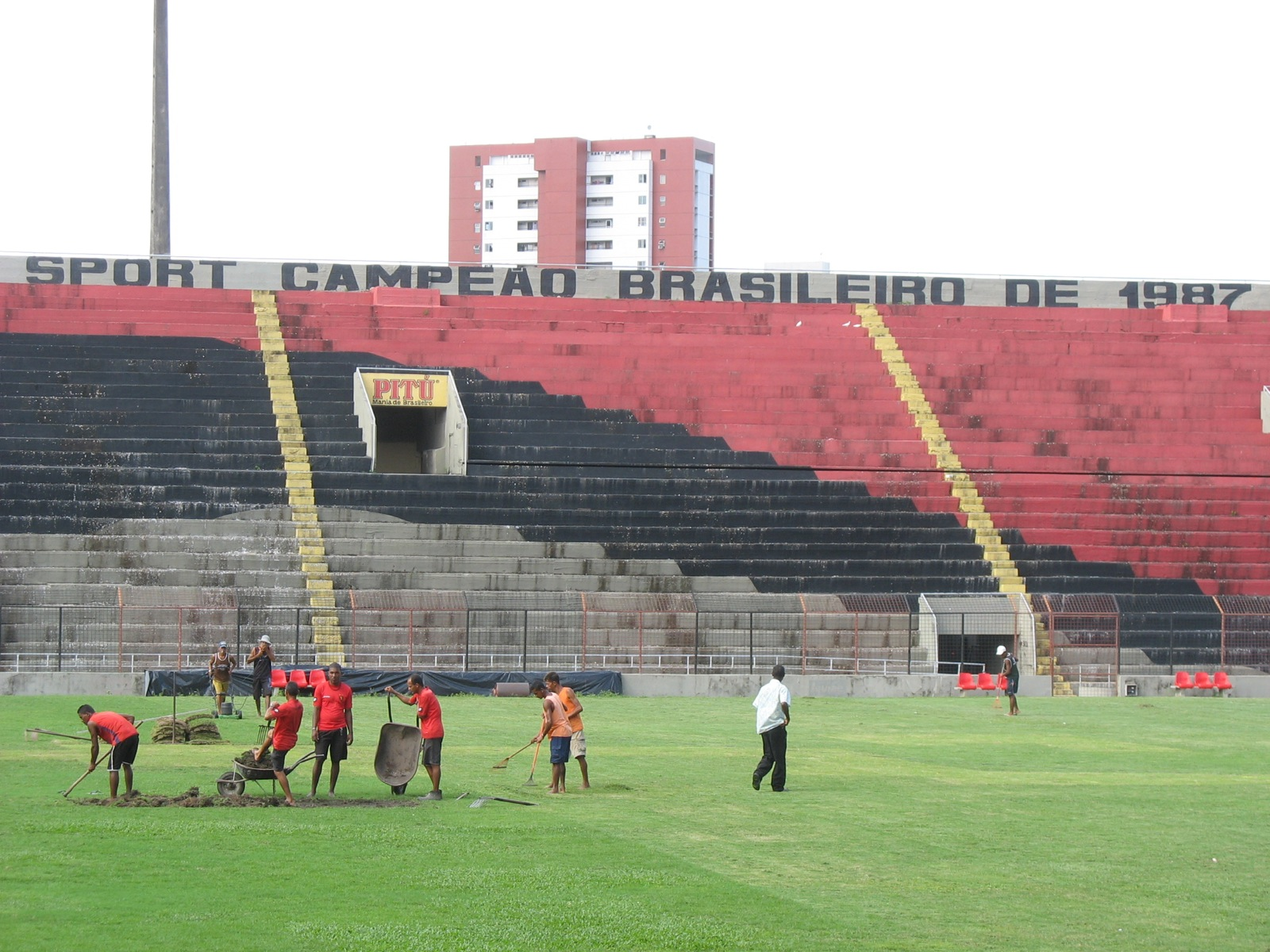 11 de julho de 2008: funcionários tentam ajeitar o campo para o próximo jogo dos campeões brasileiros de 87.